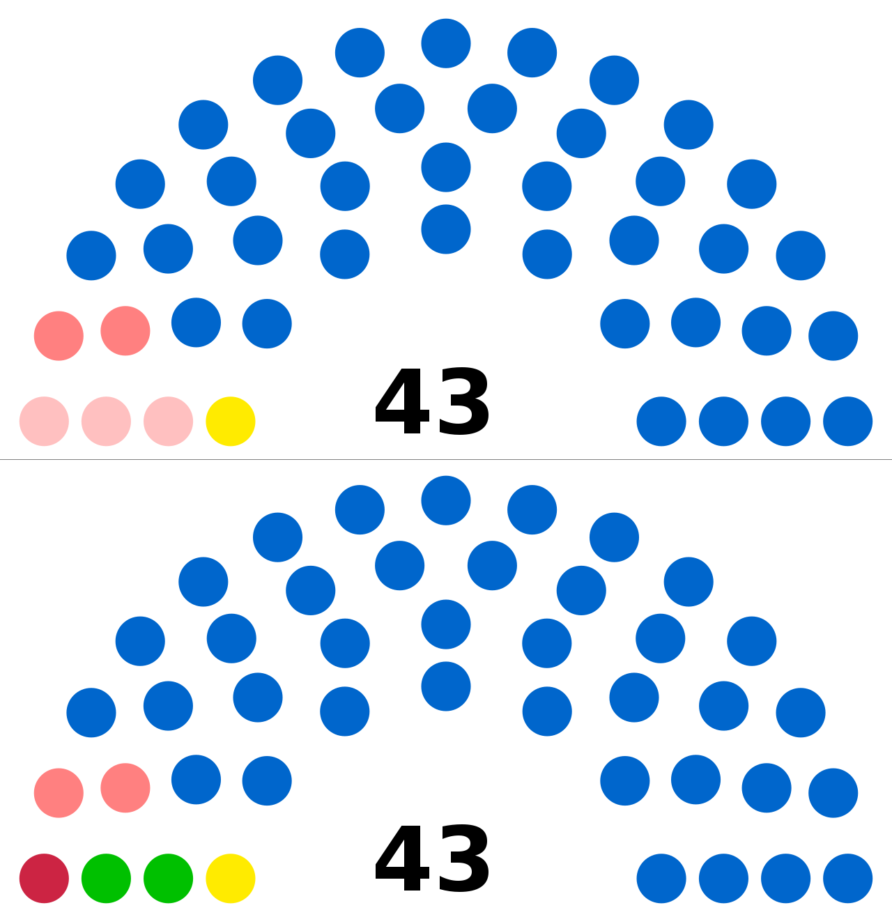 montage de File:France Saint-Priest CM nuances 2020.svg et File:France Saint-Priest CM listes 2020.svg